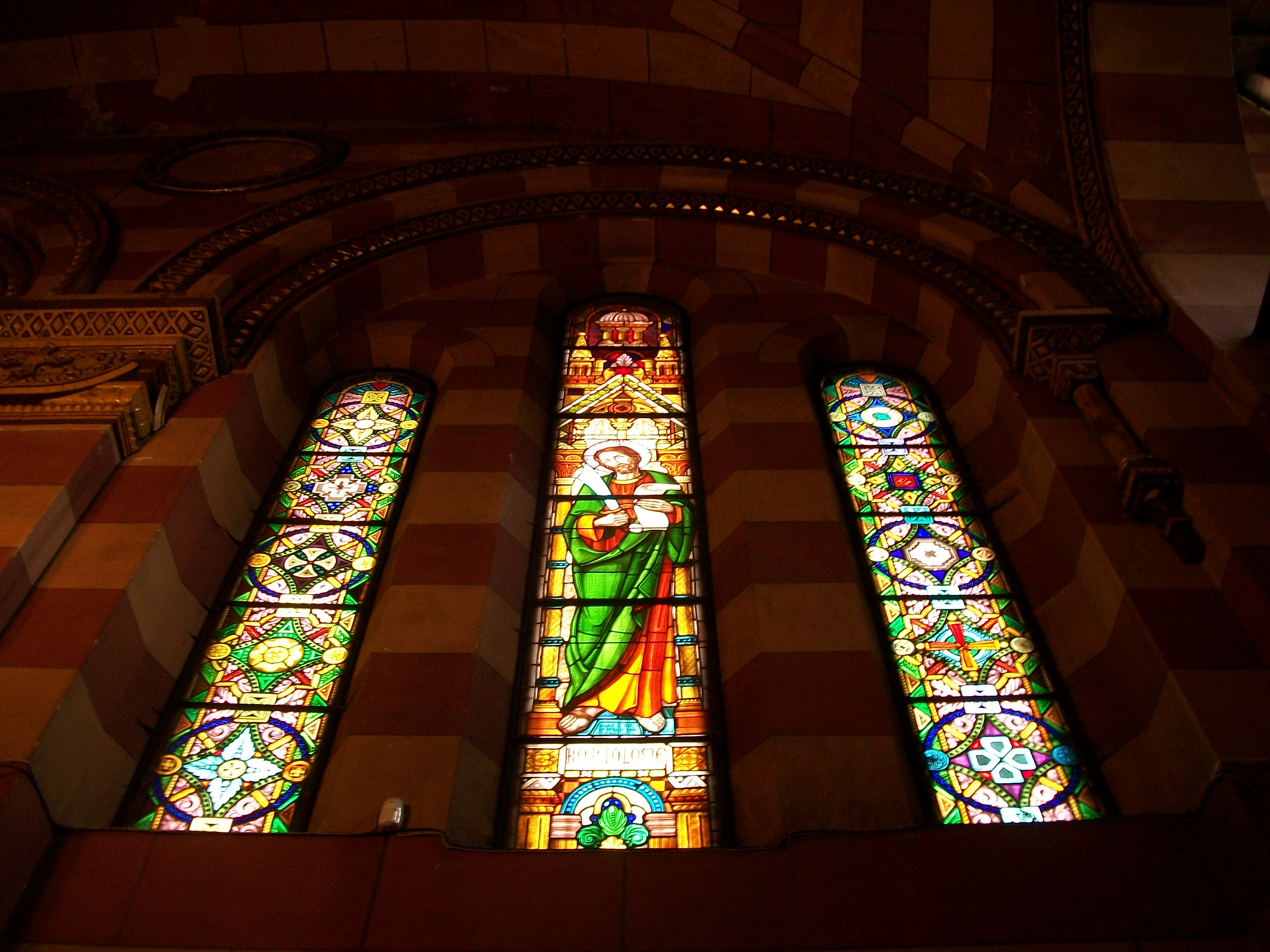 Vitrales de la Iglesia de nuestra Señora de Las Nieves, en Bogotà, en la carrera Séptima con calle Veinte.